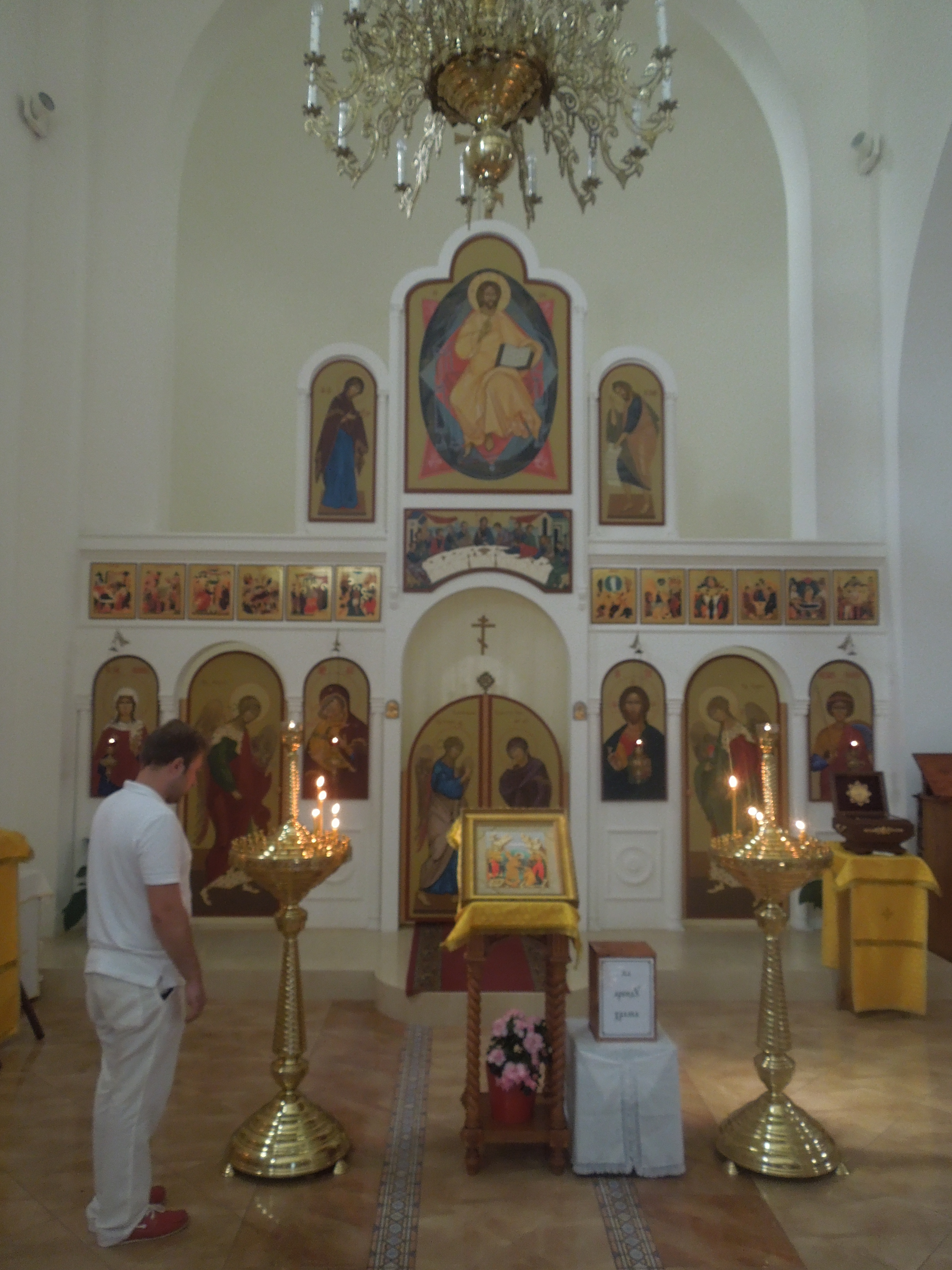 Iglesia Ortodoxa Rusa de la Anunciación, iconostasio (Barcelona)